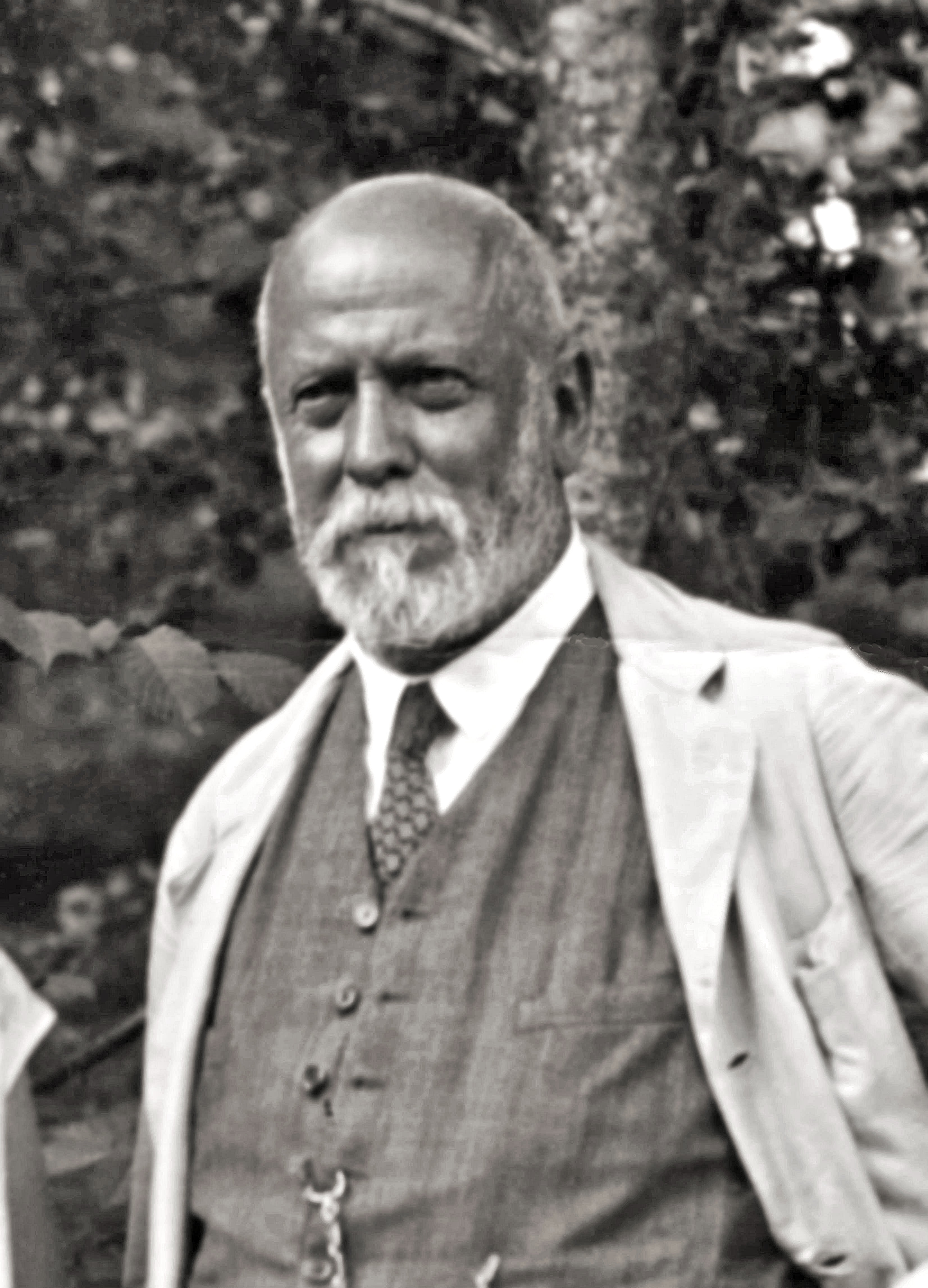 Porträtfotografie des bayerischen Richters Wilhelm Behringer (1853–1931).